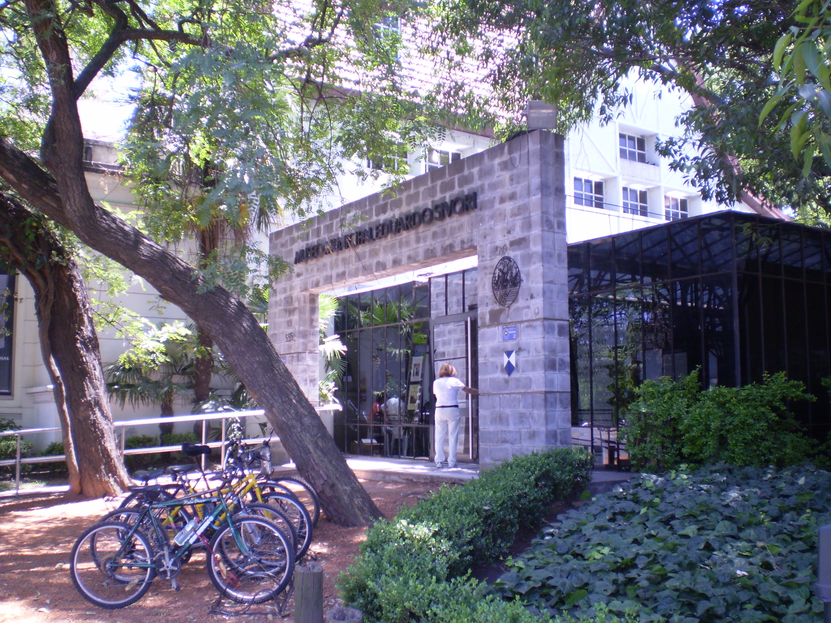 Museo de Artes Plásticas Eduardo Sívori de Buenos Aires, Argentina